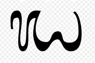 гагора